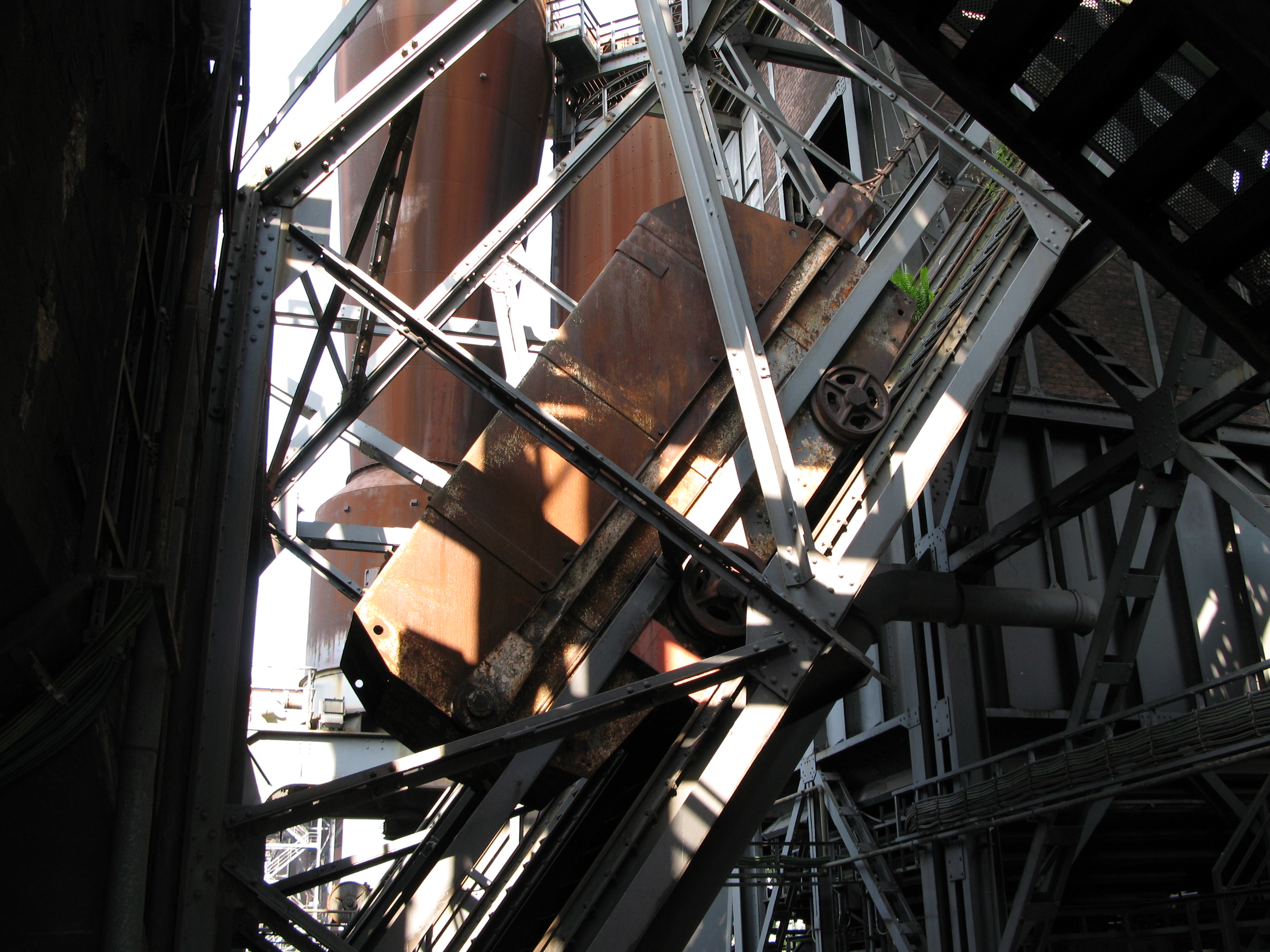 Landschaftspark Duisburg-Nord - Beschickungslore am Hochofen 5